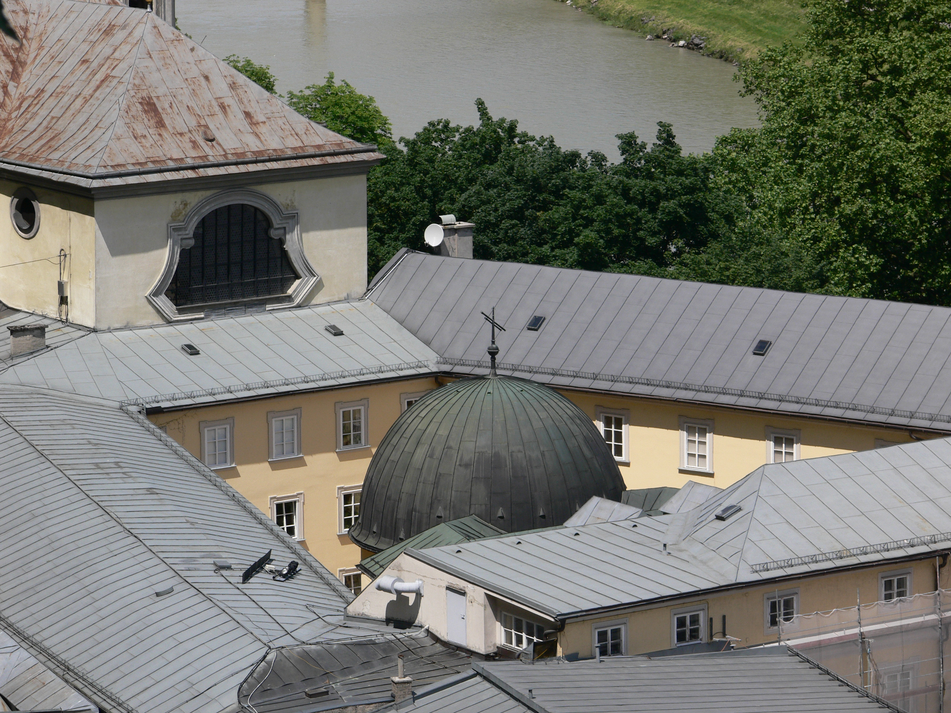 Salzburg, Aussicht vom Mönchsberg Urusulinnenkloster Salzburg (Haus der Natur)